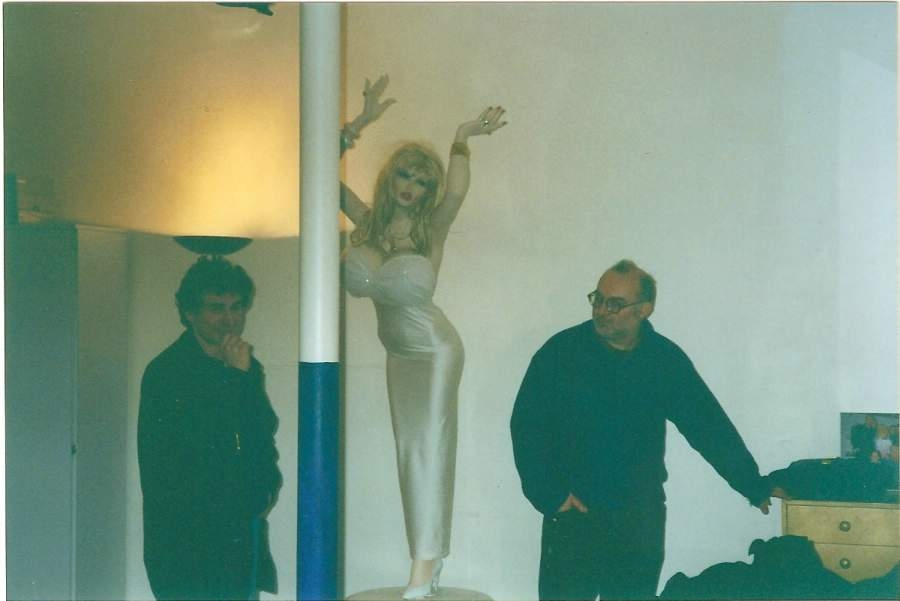 Le réalisateur du film Camping Cosmos met une poupée de Lolo Ferrari dans l'entrée d'un cinéma.